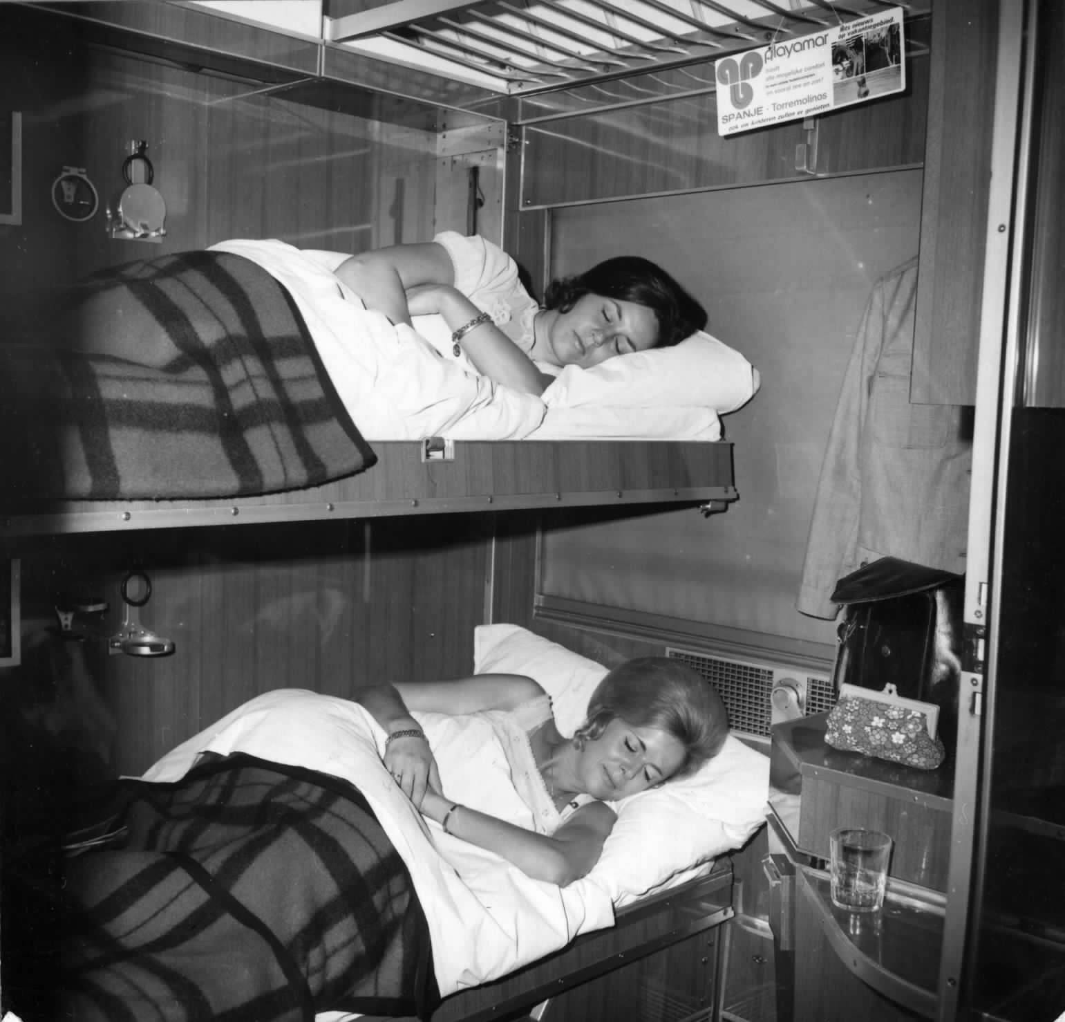 Afbeelding van reizigers in de couchette van een ligrijtuig.